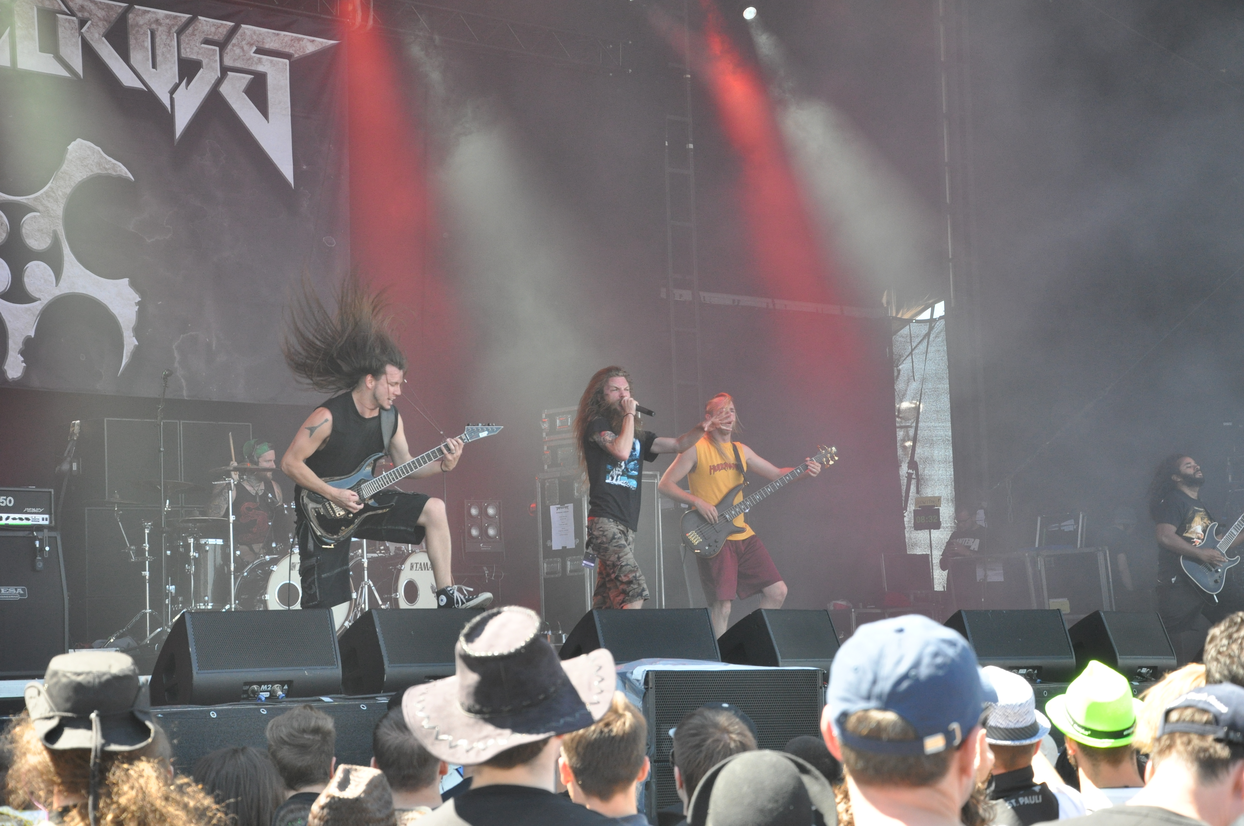 Battlecross auf der Clubstage bei Rock am Ring 2014